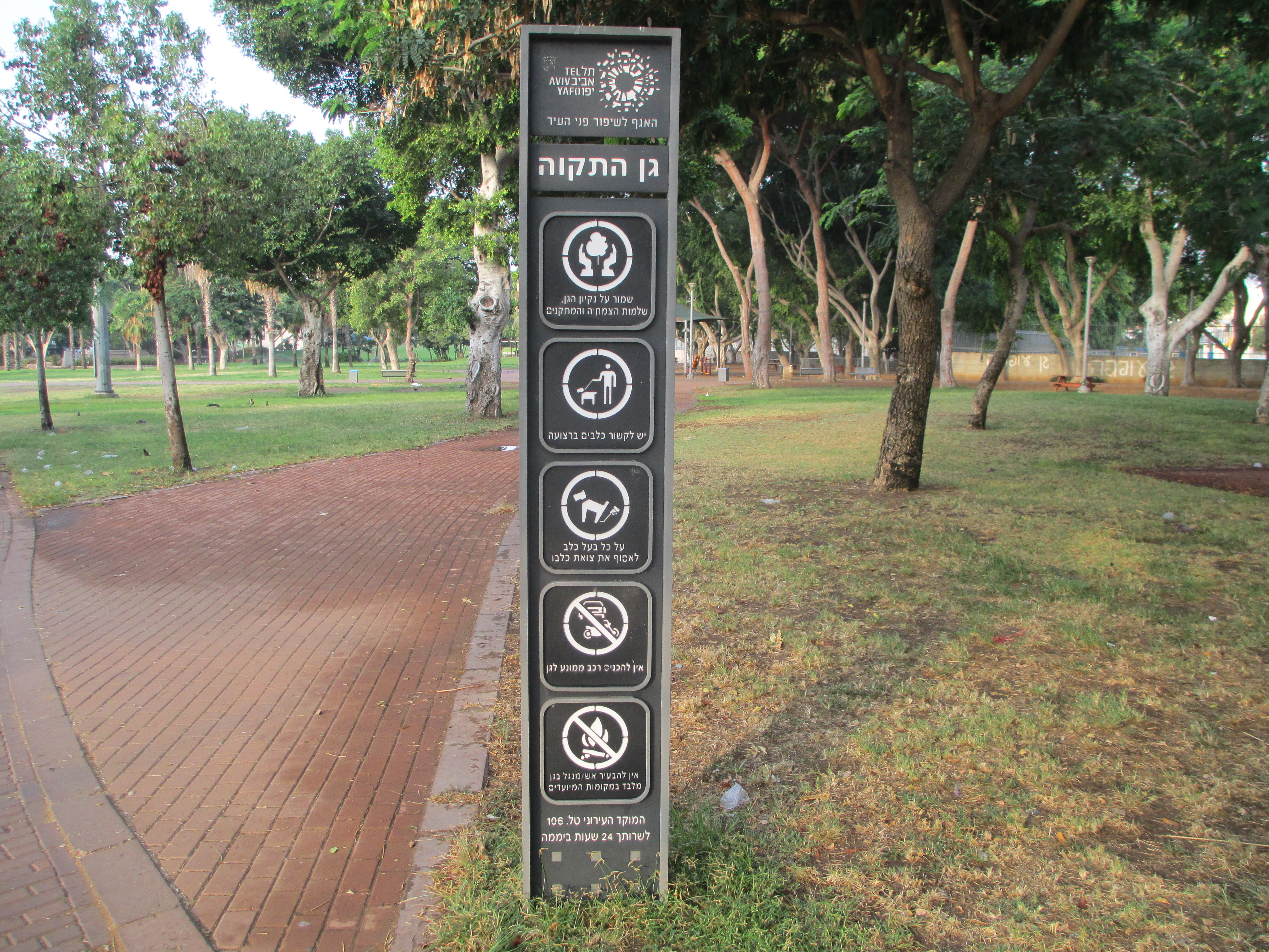 גן התקווה בתל אביב